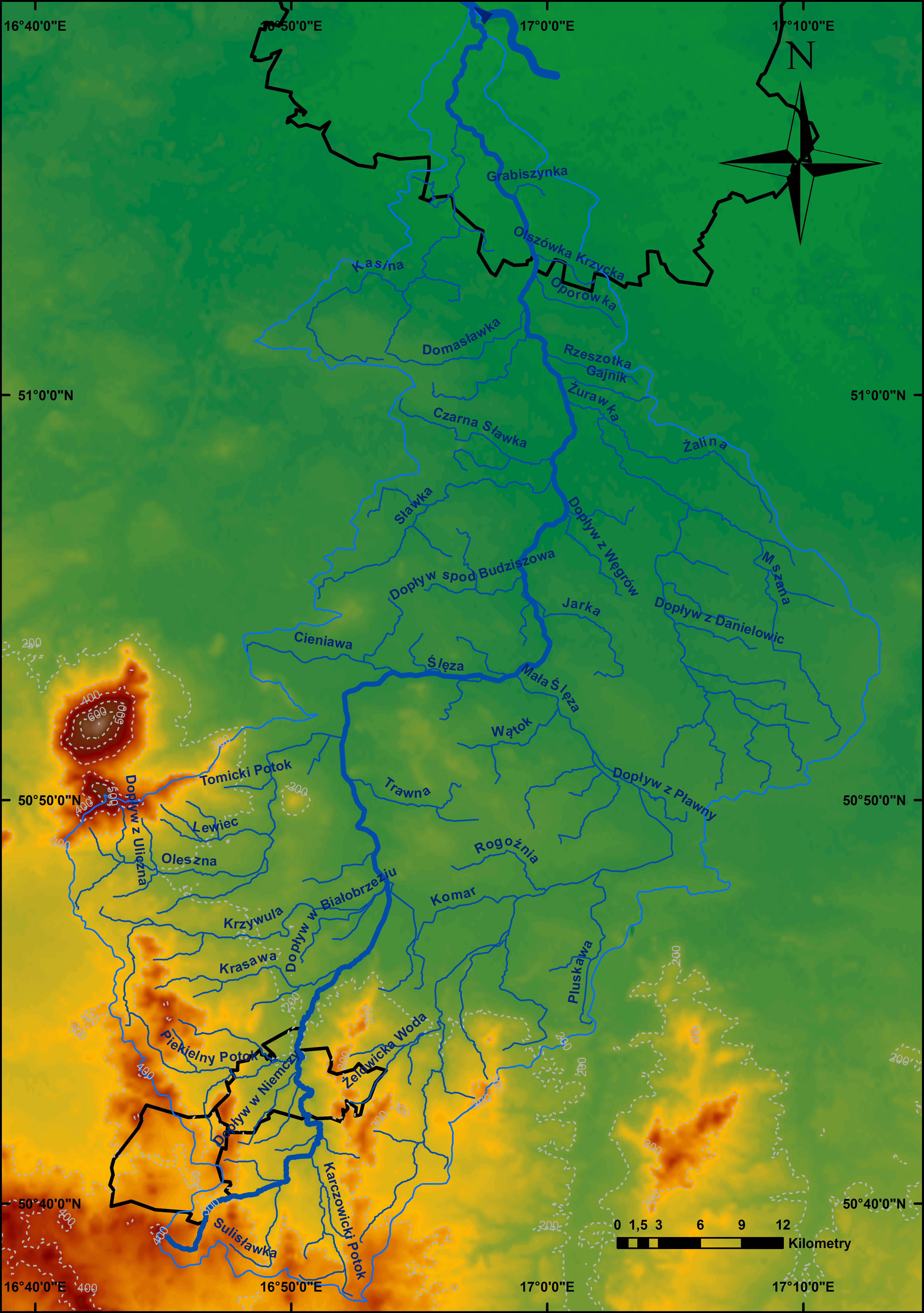 Dorzecze Ślęzy; rzeka Ślęza = pogrubiona niebieska linia, jej dopływy = cienkie niebieskie linie, Odra – fragment (recypient) = bardzo gruba niebieska linia z grotem wskazującym kierunek prądu, granica zlewni Ślęzy = jasnoniebieska linia, miasta (w granicach administracyjnych) przez które przepływa Ślęza (od źródła: Piława Górna, Niemcza, Wrocław) = czarne obrysy, izohipsy = szare obrysy przerywane